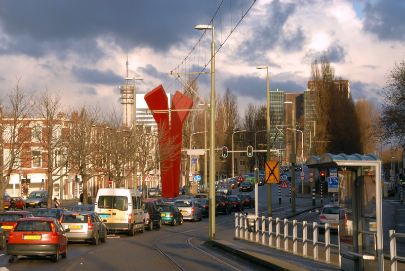 Schenkviaduct, Rivierenwijk, Den Haag